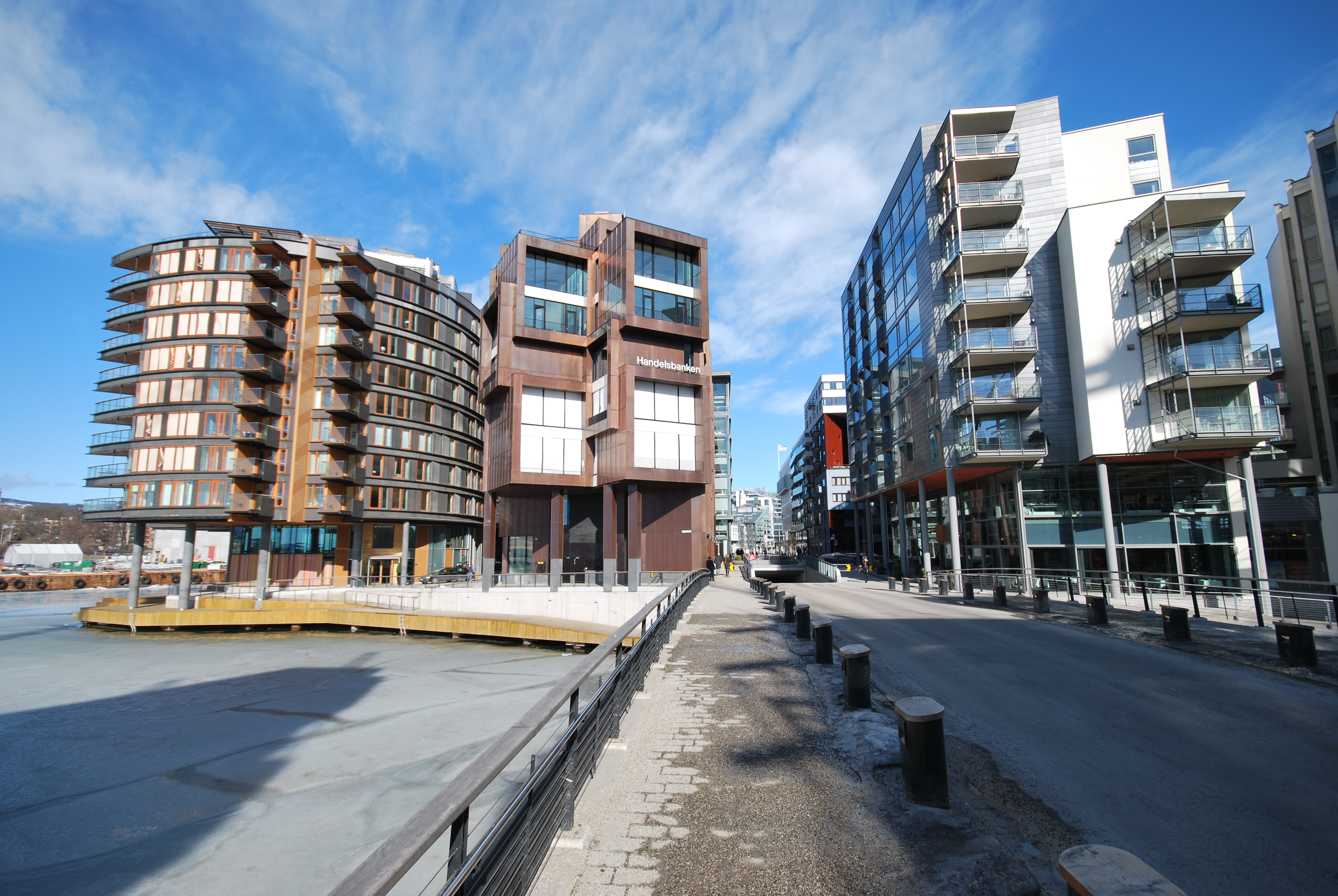 Odden sett fra broen til Holmen, med Tjuvholmen allé, Tjuvholmen, Oslo